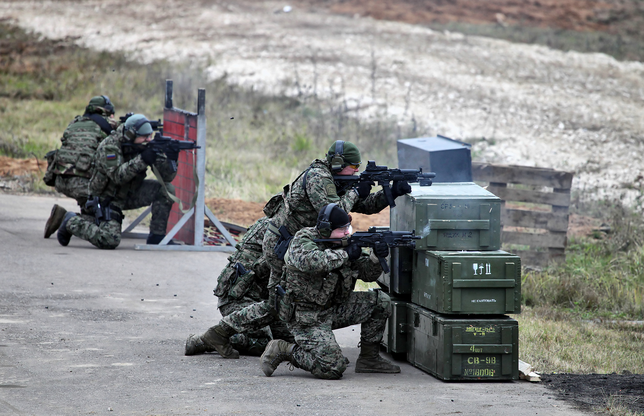 После задержания сотрудники ОСН Гром продемонстрировали тактику действий при отражении нападения на автотранспорт (After that OSN Grom operators demonstrated the tactics in ambush situation and evacuation)